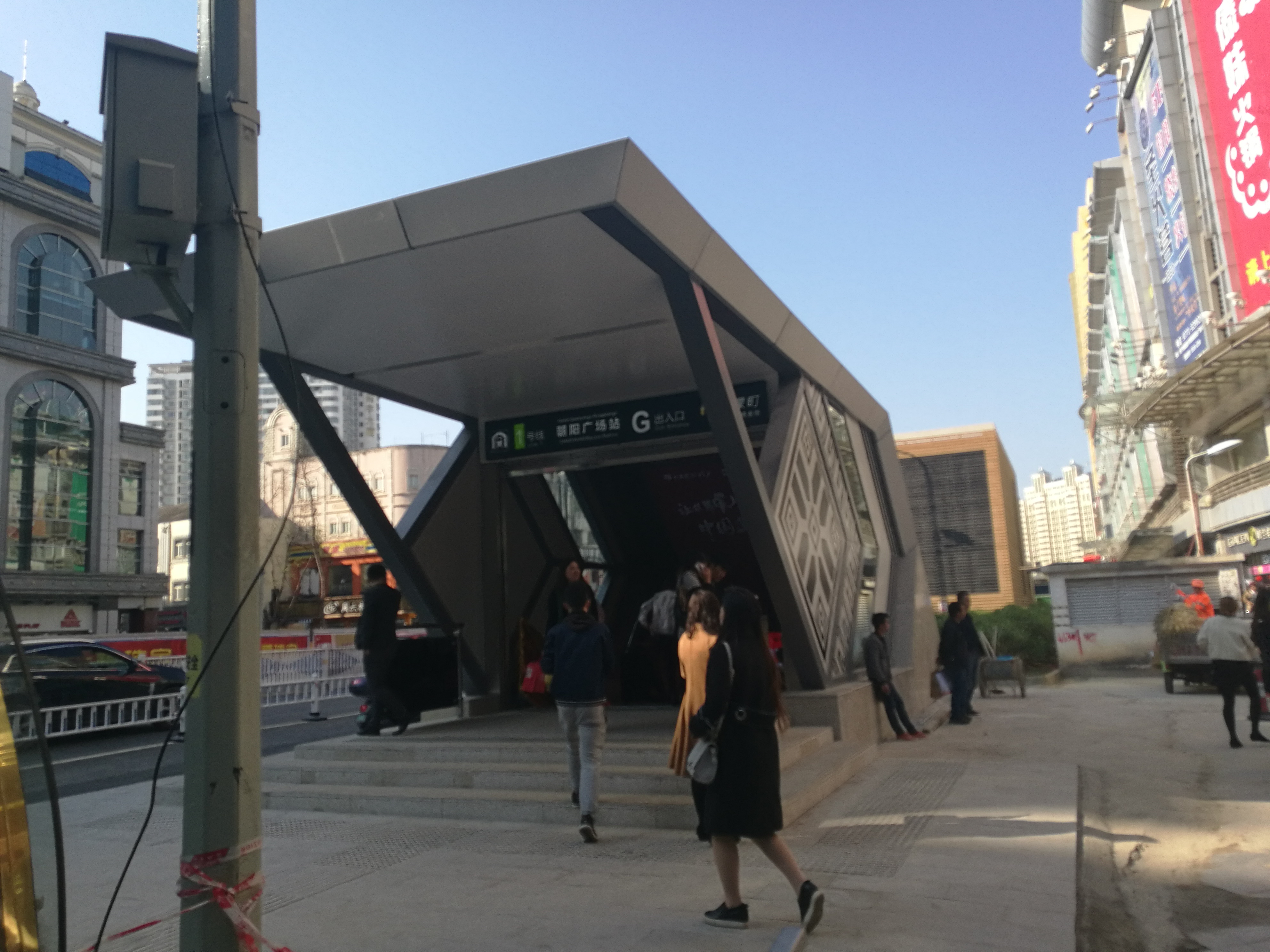 南宁轨道交通朝阳广场站